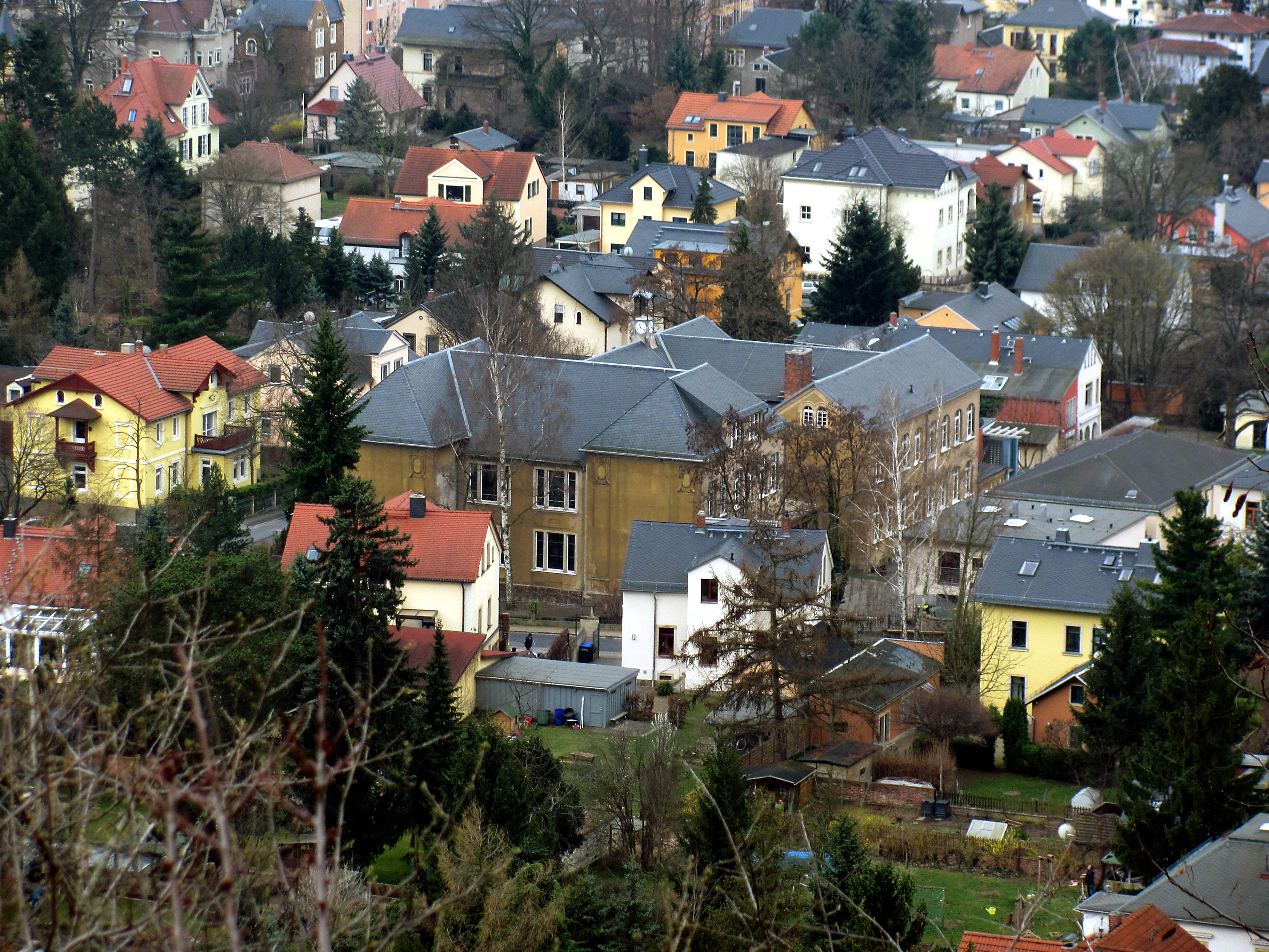 Radebeul-Niederlößnitz, Grundschule Niederlößnitz, Blick vom öffentlichen Aussichtspunkt unterhalb der Friedensburg (Radebeul) auf die Winzerstraßen-Ansicht, rechts der Turnhallenbau